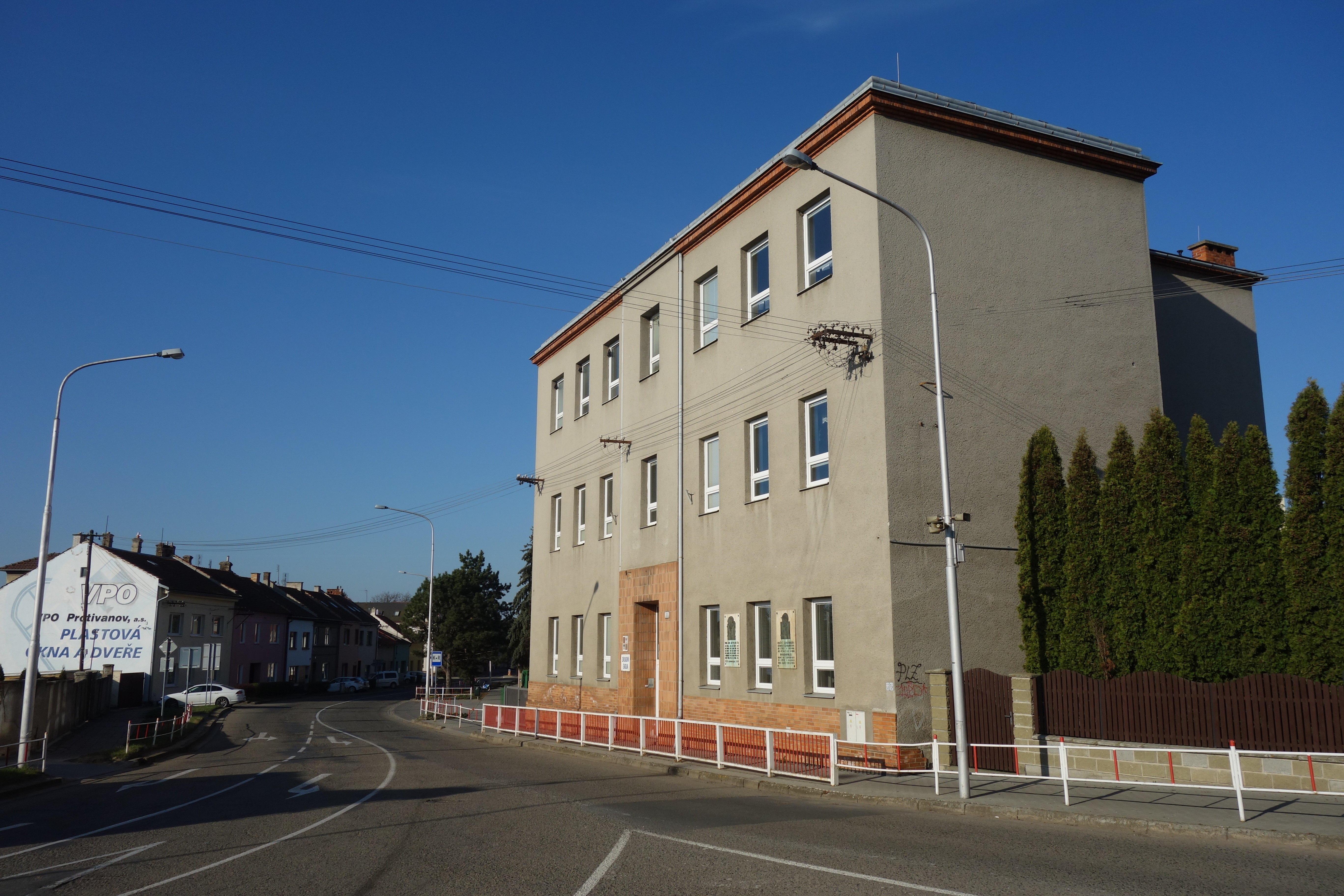 jedna z budov ZŠ Majakovského